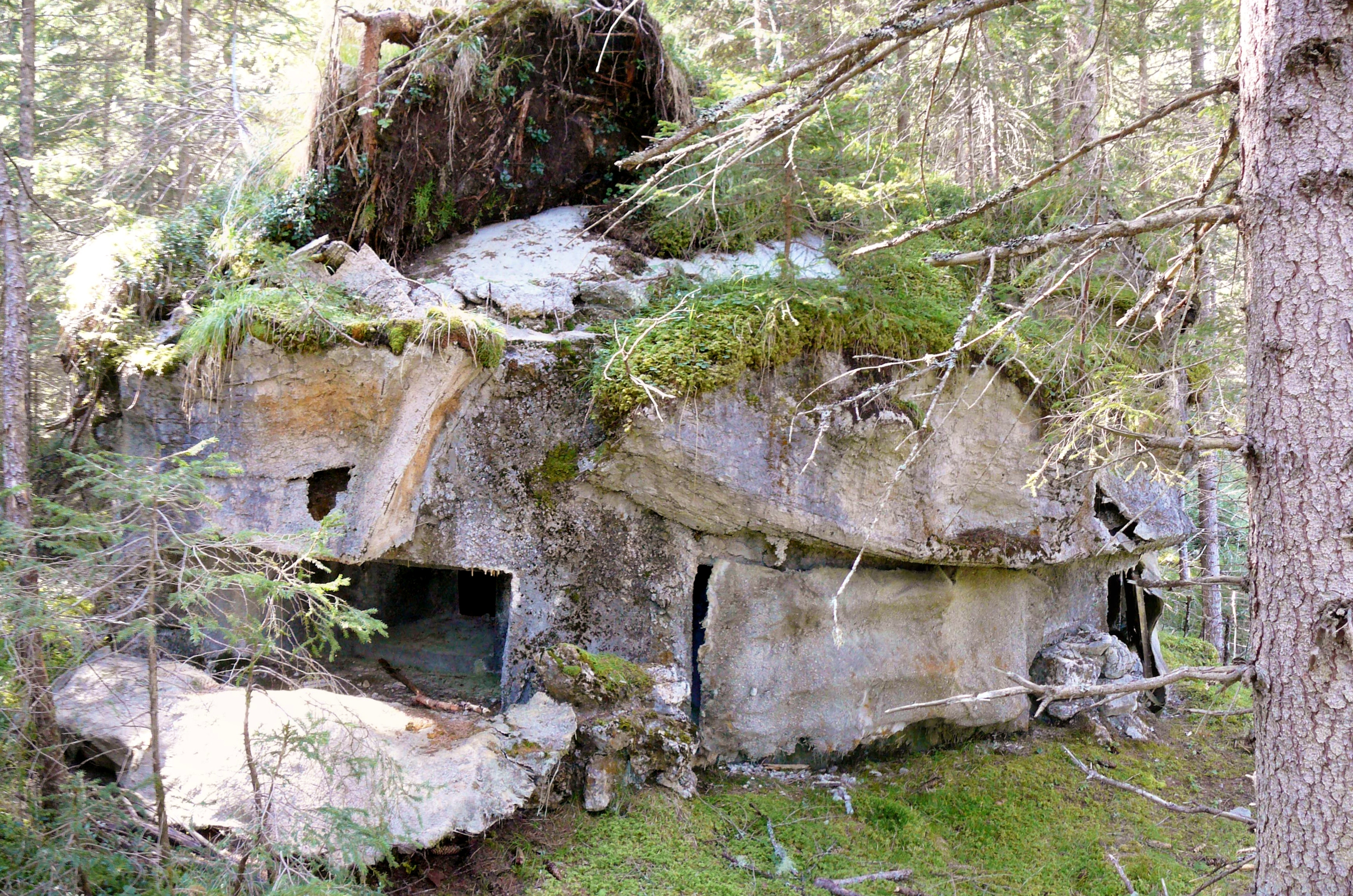 Opera 4.1 LandroNord, torretta